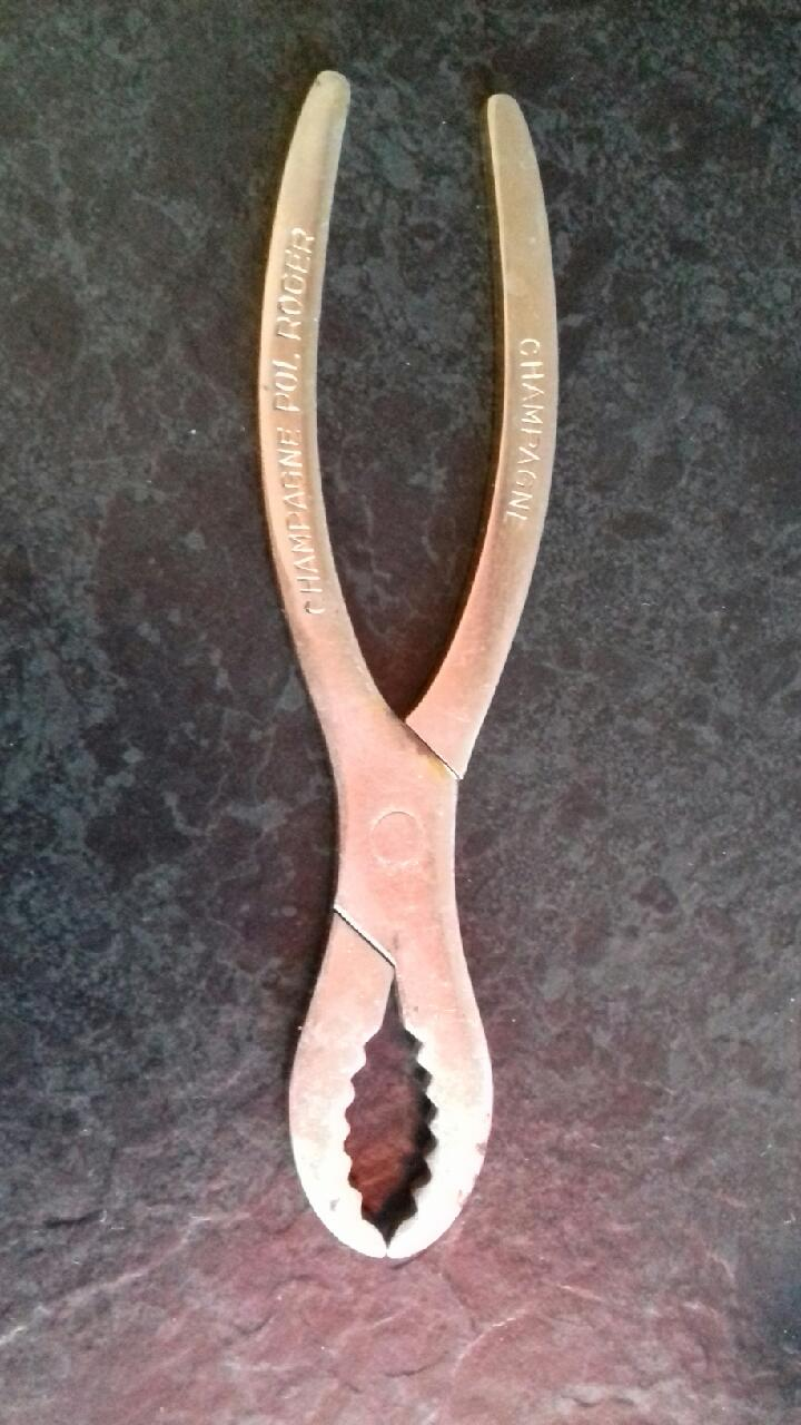 Sert à enlever le bouchon récalcitrant d'une bouteille de champagne, voire d'une bouteille de vin mousseux ou de bière.